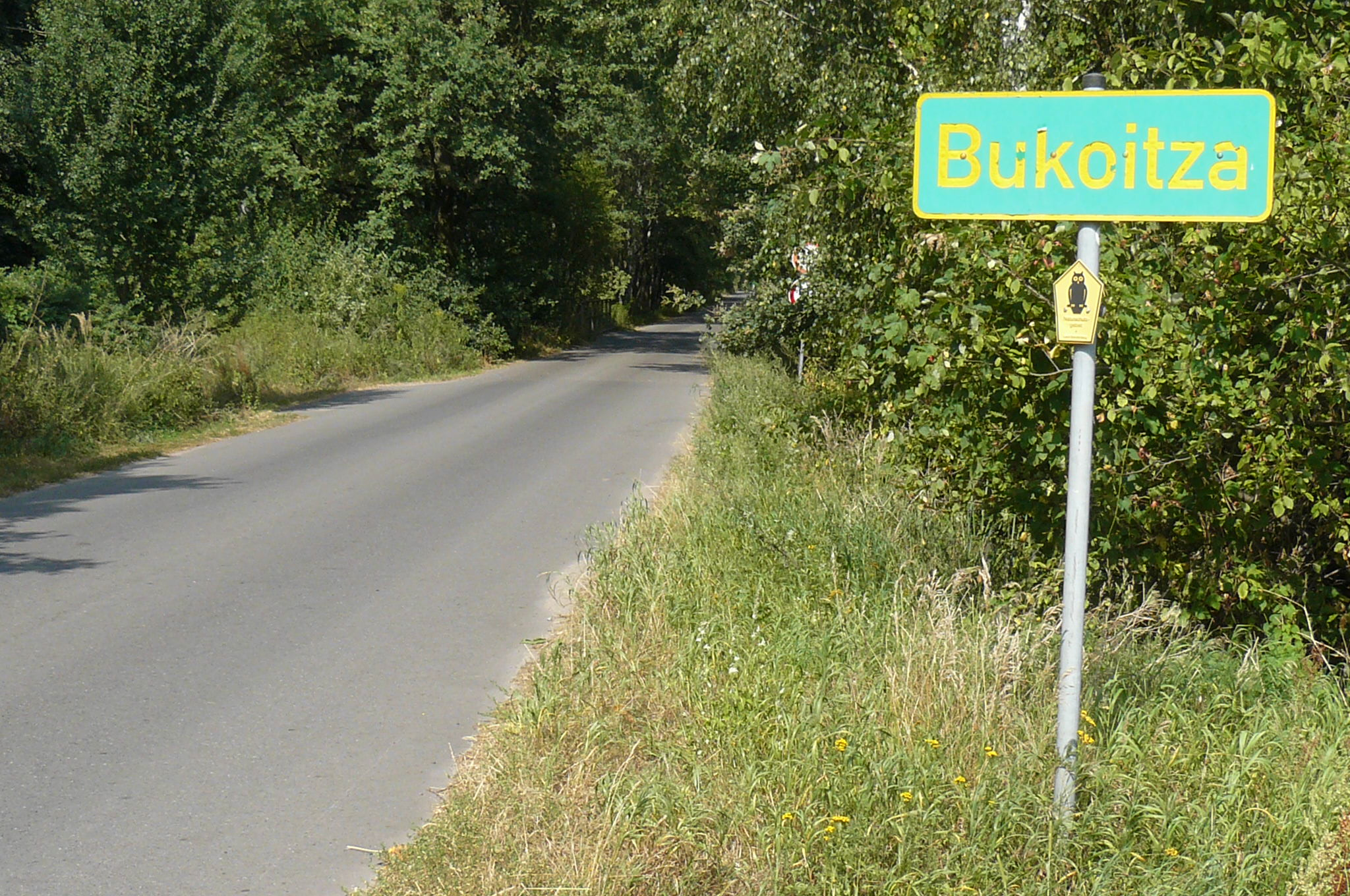 Ortshinweistafel von Bukoitza, Spreewald.